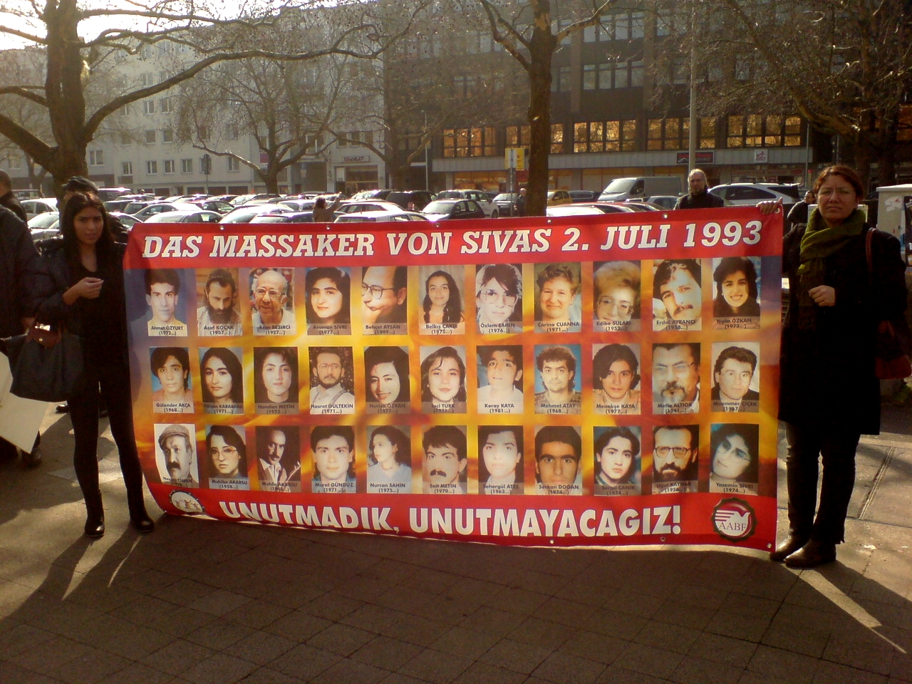 Transparent mit Fotos der Opfer vom Brandanschlag von Sivas vom 2. Juli 1993